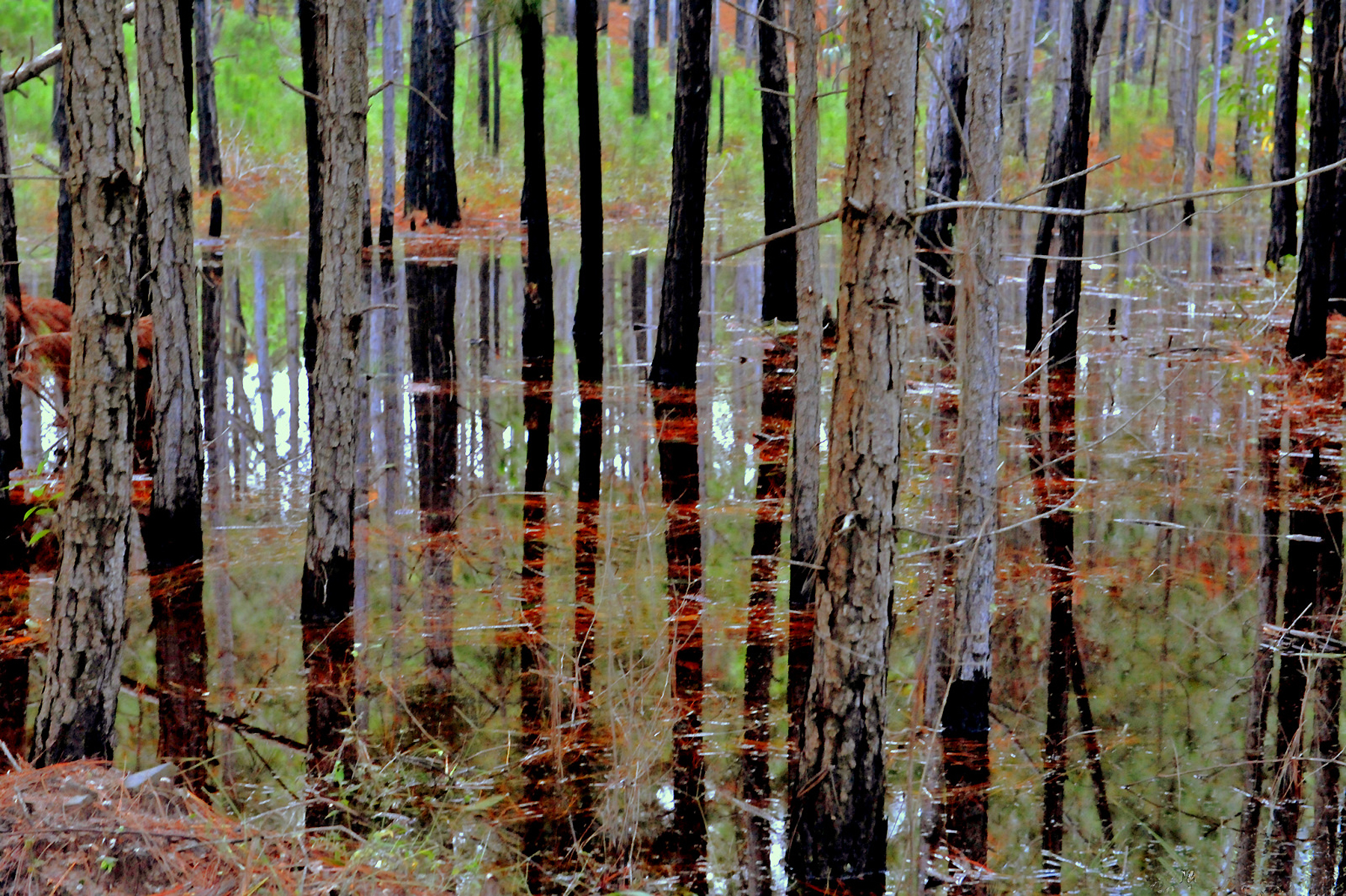 O Parque Estadual do Rio Vermelho (PAERVE) criado pelo Decreto nº 308 de 24 de maio de 2007 está localizado na costa leste da ilha de Santa Catarina, município de Florianópolis. Seus limites são o distrito do Rio Vermelho ao norte, a Lagoa da Conceição ao oeste, a praia de Moçambique ao leste e o distrito da Barra da Lagoa ao sul.1 Sua área é de 1.532,30 hectares e foi reconhecida em 1962 como Estação Florestal, usada como local de experiência para o plantio de espécies exóticas, do gênero Pinus e Eucalyptus. O plantio destas espécies ocorreu até 1970, o que ocasionou uma grande variação na restinga, que é um ecossistema associado ao bioma Mata Atlântica. Em 1994, passou a categoria de Parque Florestal, e a partir de 2007 recebeu a denominação de Parque Estadual do Rio Vermelho, compondo uma unidade de conservação do estado.